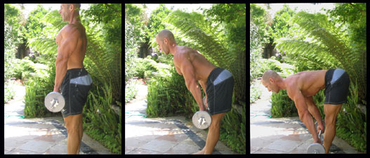 Stiff leg deadlift exercise for hamstrings